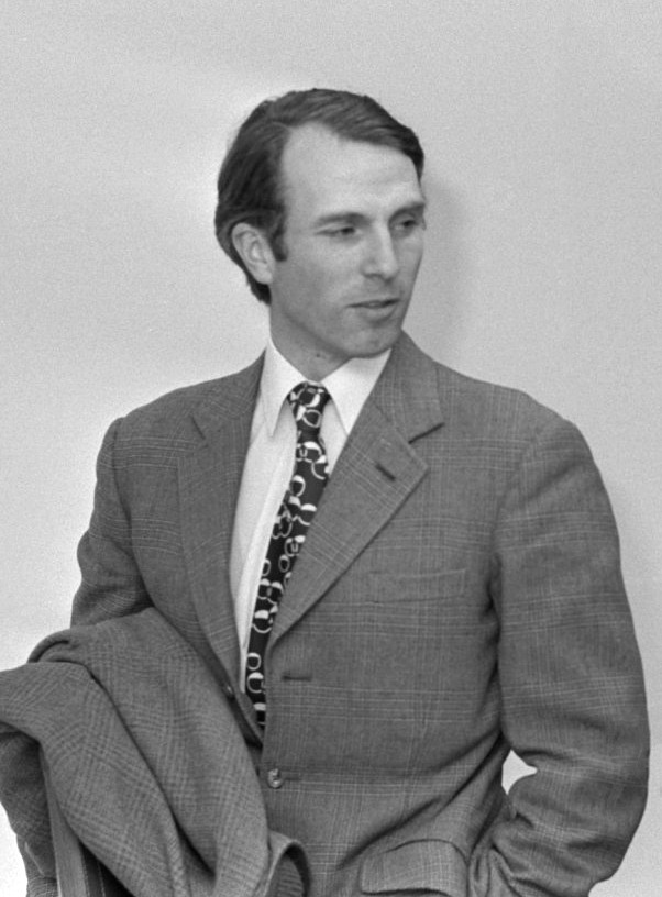 Mark Philips (echtgenoot van Prinses Anne ) in Nederland voor Jumping Amsterdam